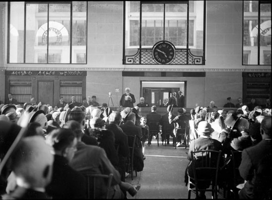 Fonds Trutat - Photographie ancienne Cote : BIBLC06 Localisation : Fonds ancien (S 30) Original non communicable Titre : Discours d'inauguration dans la grande salle de lecture de la Bibliothèque municipale de Toulouse, rue de Périgord, le 30 mars 1935 Auteur : Trutat, Eugène Rôle de l’auteur : Photographe Lieu de création : Toulouse (Haute-Garonne) Date de création : 1935 Mot(s)-clé(s) : -- Intérieur -- Salle -- Lecture -- Bibliothèque -- Groupe -- Discours -- Inauguration -- Table -- Chaise -- Fenêtre -- Horloge -- Haut fonctionnaire -- Bibliothèque municipale de Toulouse -- Toulouse (Haute-Garonne) -- Haute-Garonne (Midi-Pyrénées) -- France -- 20e siècle, 2e quart -- Epoque Art déco Médium : Photographies -- Noir et blanc -- Scènes d'intérieur Bibliothèque de Toulouse. Domaine public